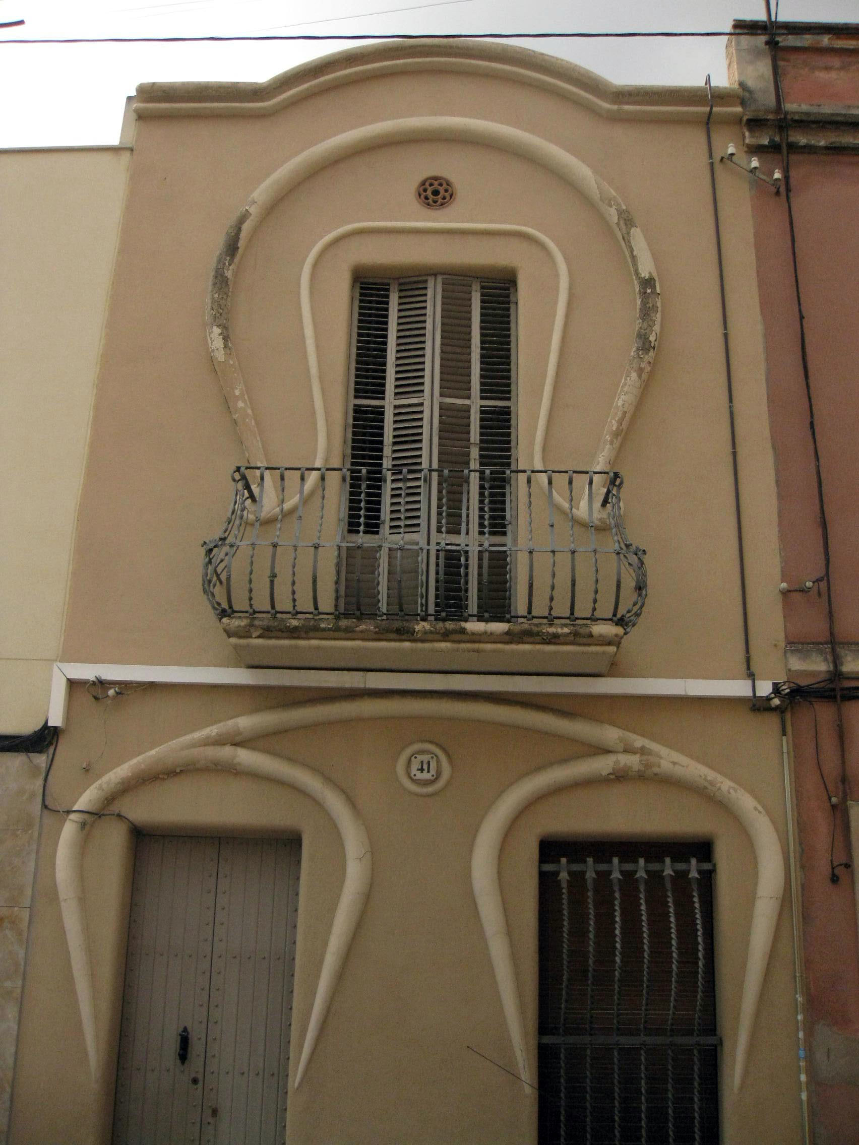 Casa Salvador Carreras, al carrer del Comte Borrell núm. 41 (Terrassa). Edifici modernista d'Antoni Pascual i Carretero (1904).